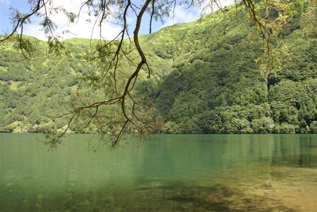 Lagoa das Sete Cidades, Ilha de São Miguel, Açores, Portugal